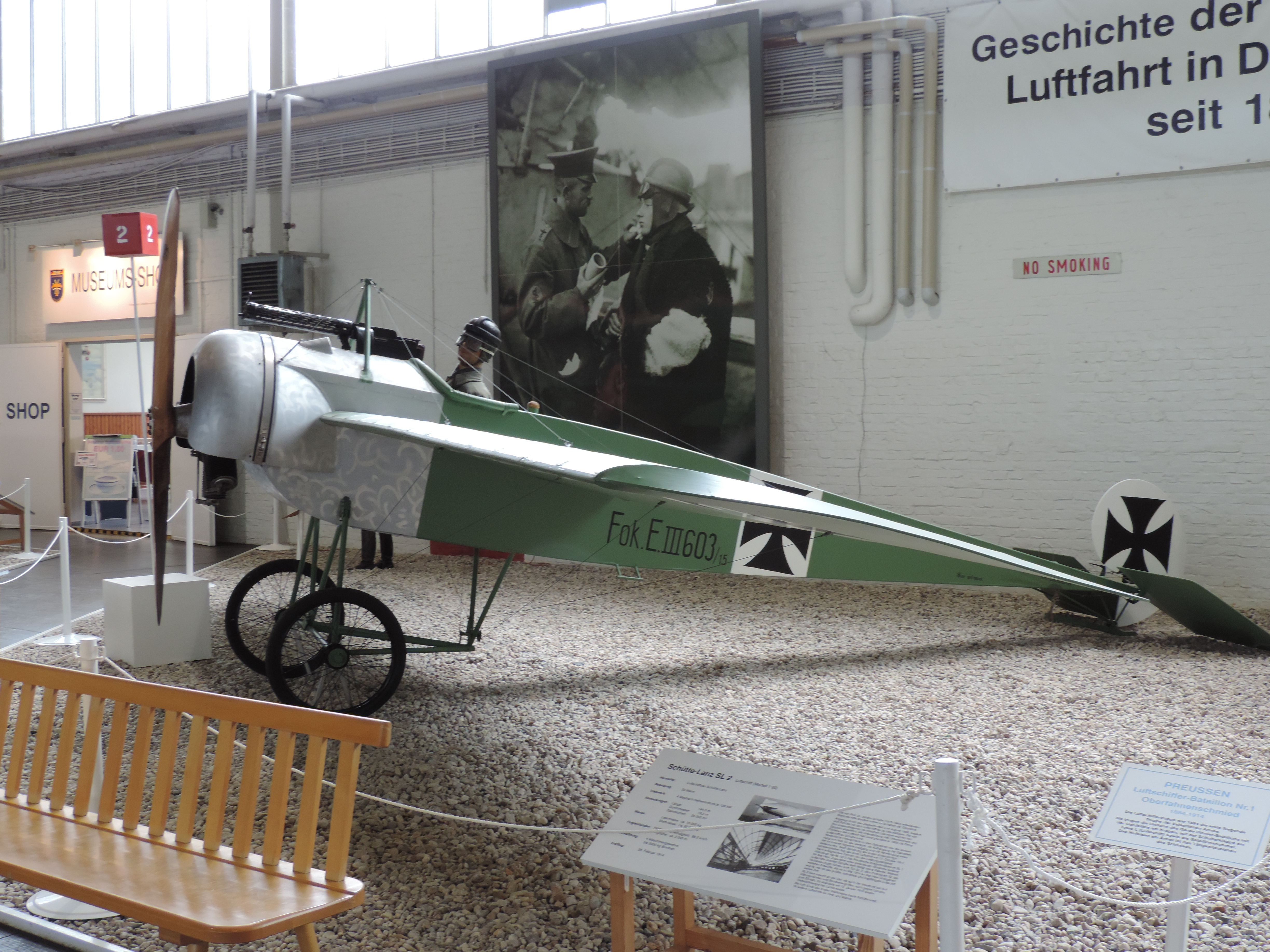 Fokker E III Lufwaffenmuseum Gatow